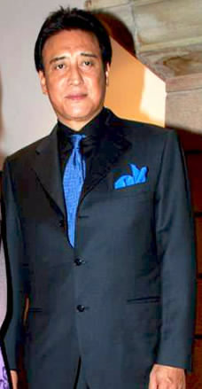 Danny Denzongpa at Dr Agarwal's daughter's wedding